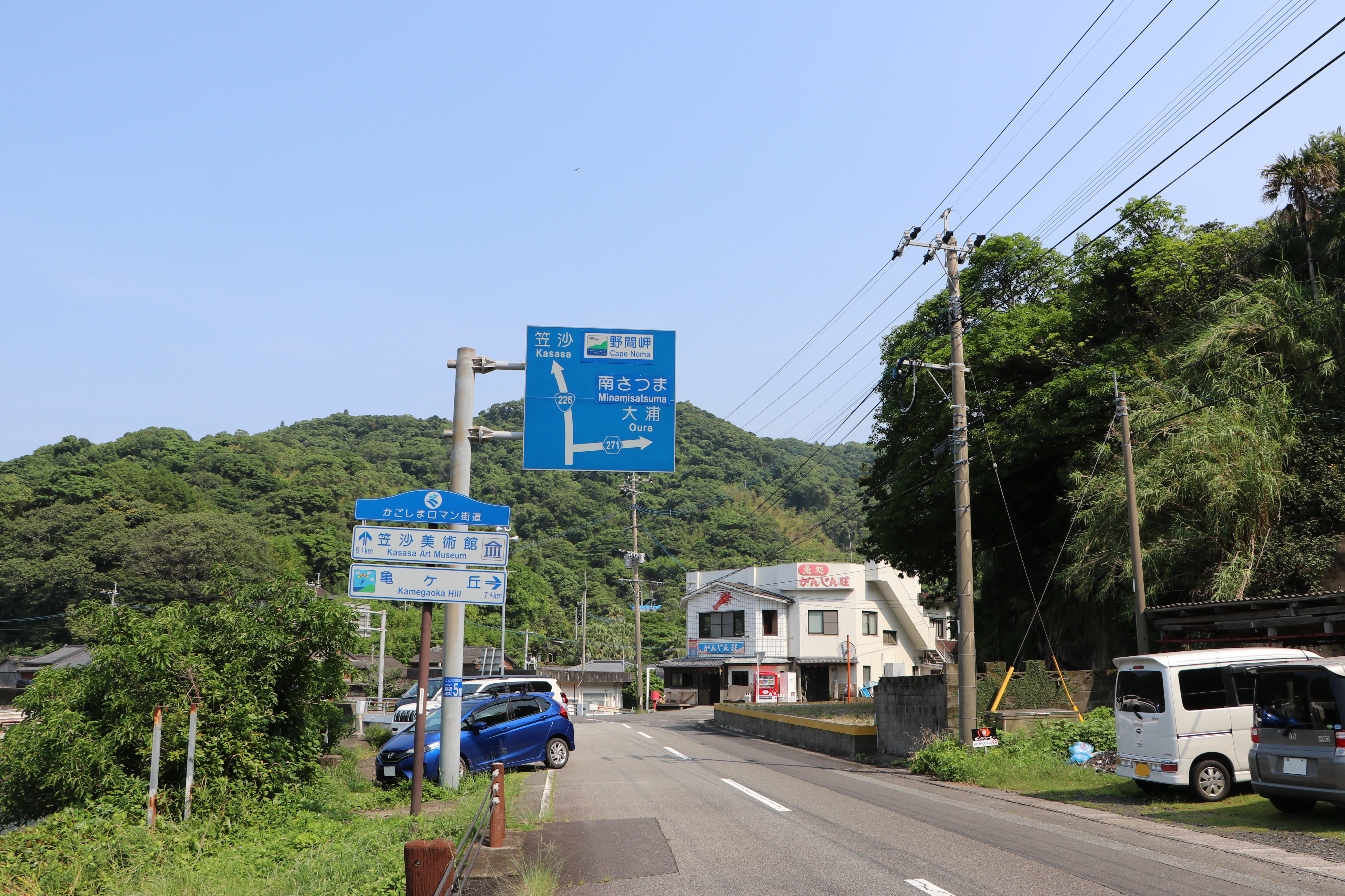 坊津町秋目にある国道226号と鹿児島県道271号秋目上津貫線の交差点 Canon EOS 80D